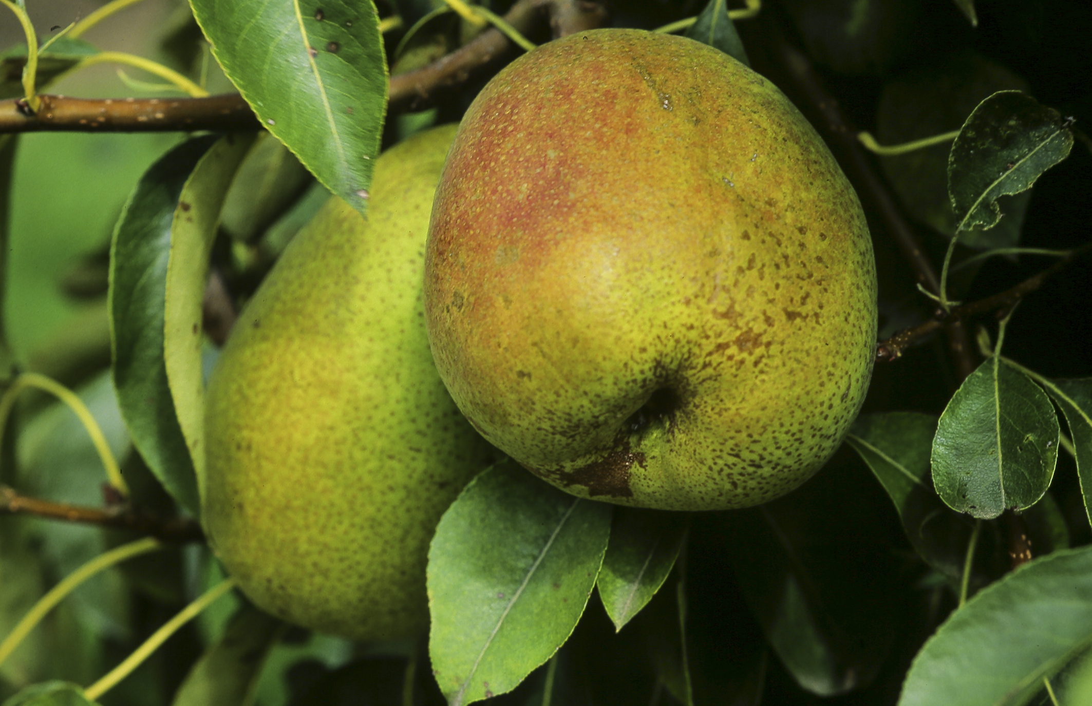 INRA, Jean Weber